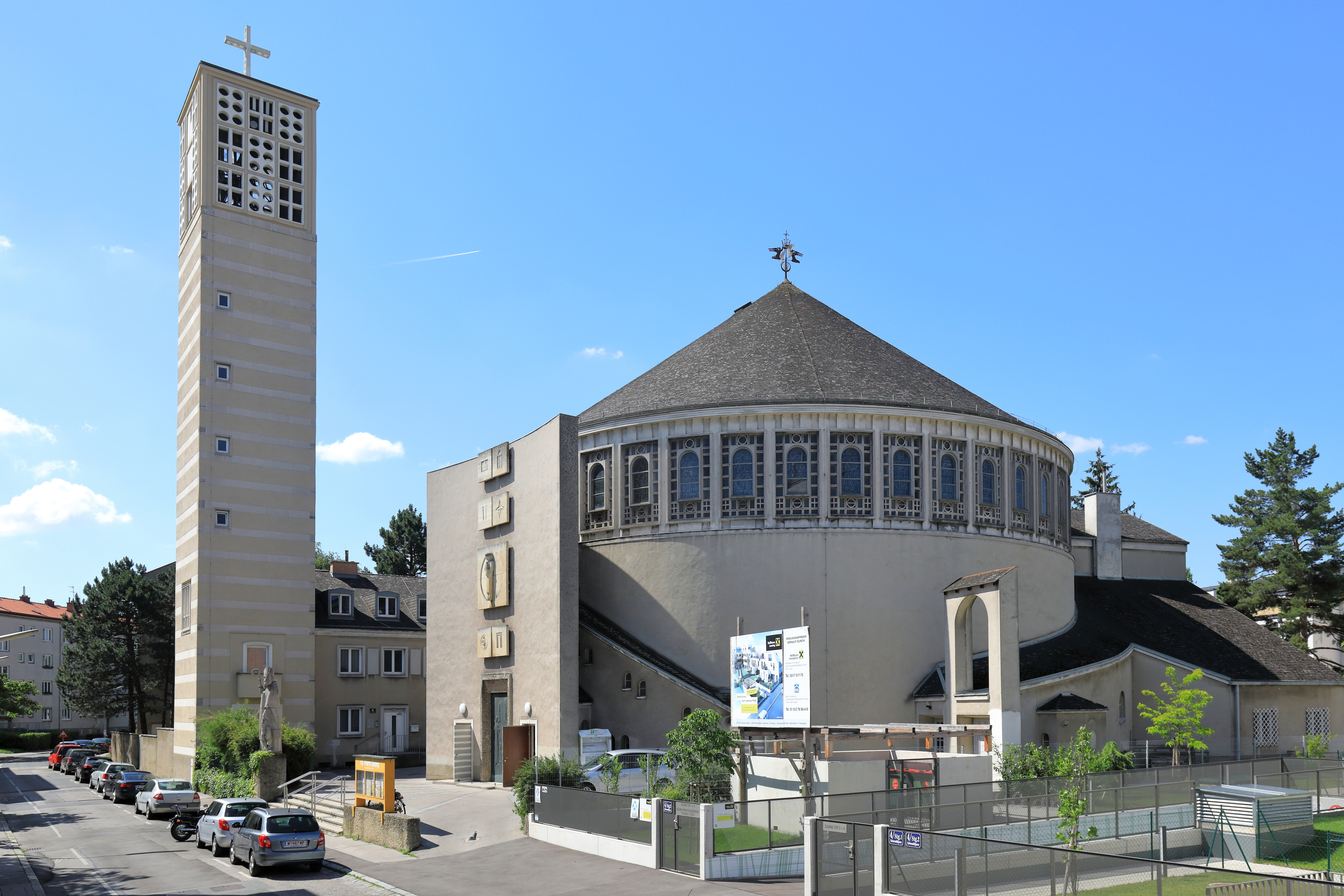 Die röm.-kath. Pfarrkirche Maria, Mutter der göttlichen Gnade im 23. Wiener Gemeindebezirk Liesing.Der ovale Zentralkuppelbau aus Stahlbeton mit freistehenden Kirchturm wurde von 1953 bis 1955 nach Plänen von Robert Kramreiter als Ersatz für die im II. WK zerstörte Kirche (1944) errichtet. Die Reliefplatten über dem Hauptportal sind Werke des Bildhauers Josef Pillhofer. Auf dem Treppenaufsatz vor der Kirche ist eine Statue des heiligen Servatius, ursprünglich Hauptpatron der Liesinger Kirche, von Adolf Treberer-Treberspurg.